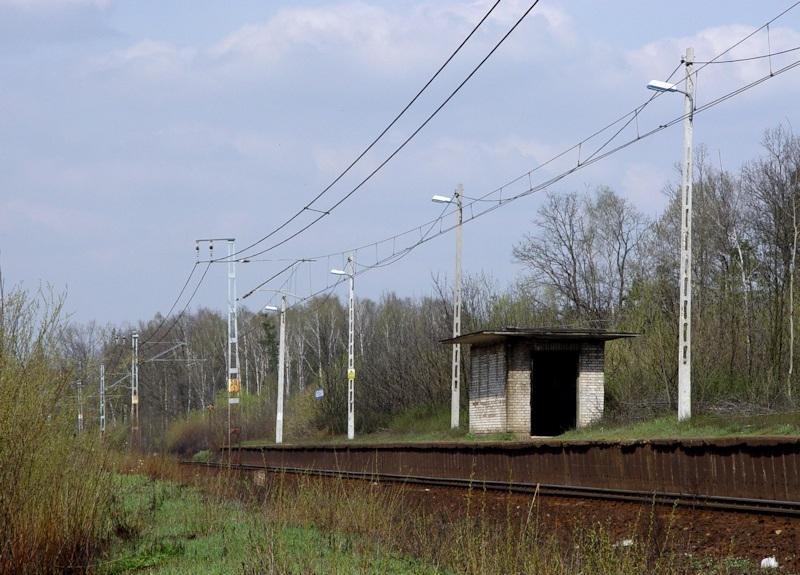 Stacja PKP Augustówka